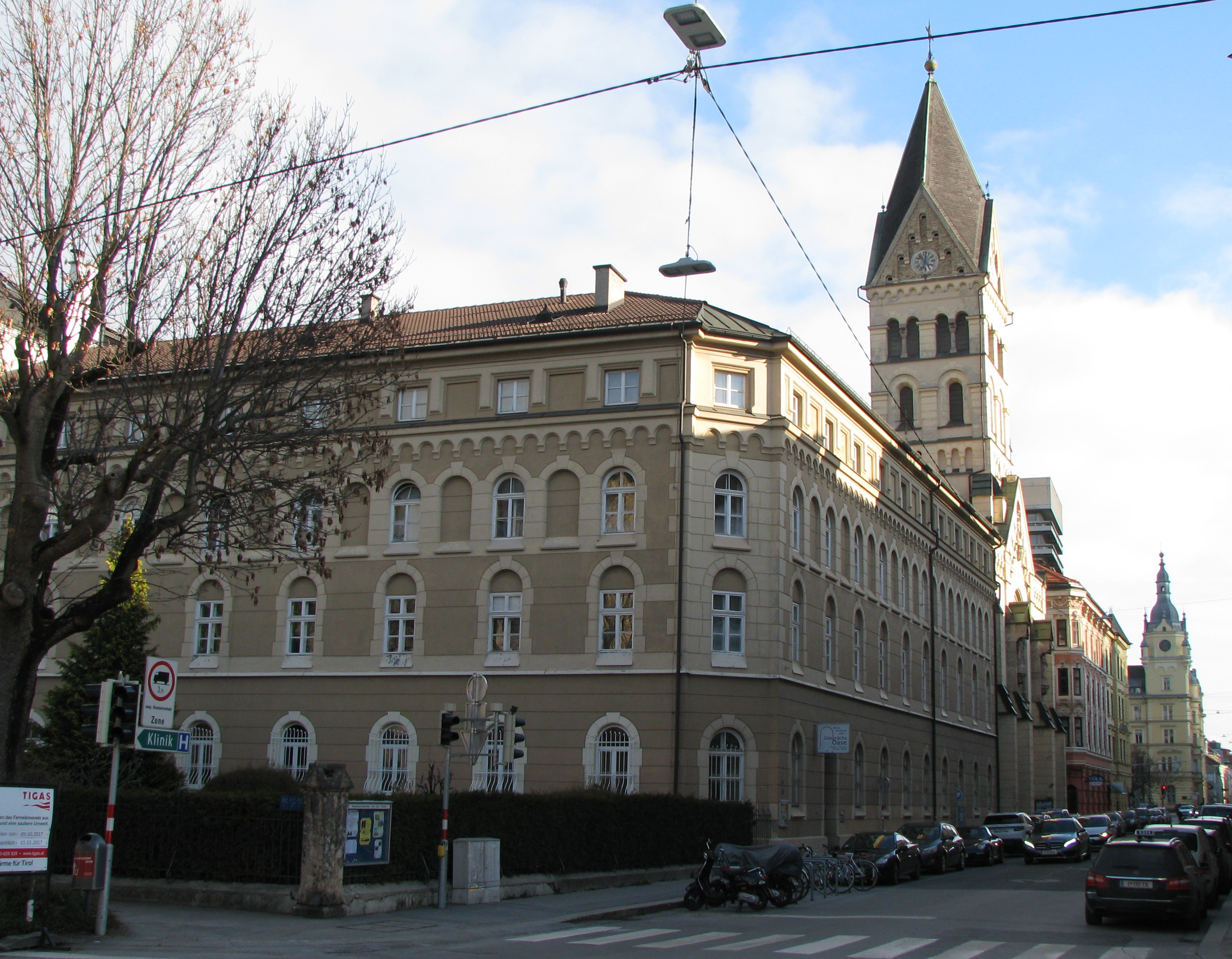 Redemptoristenkolleg mit Herz-Jesu-Kirche, Innsbruck